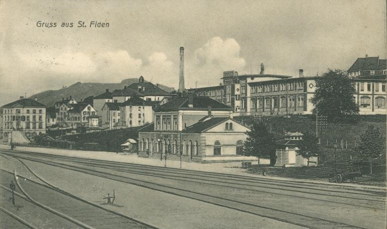 Aufnahmegebäude des Bahnhofs St. Gallen St. Fiden auf einer Postkarte aus dem Jahr 1911. Der Mittelperron und die Bahnsteigüberdachungen sind noch nicht gebaut.